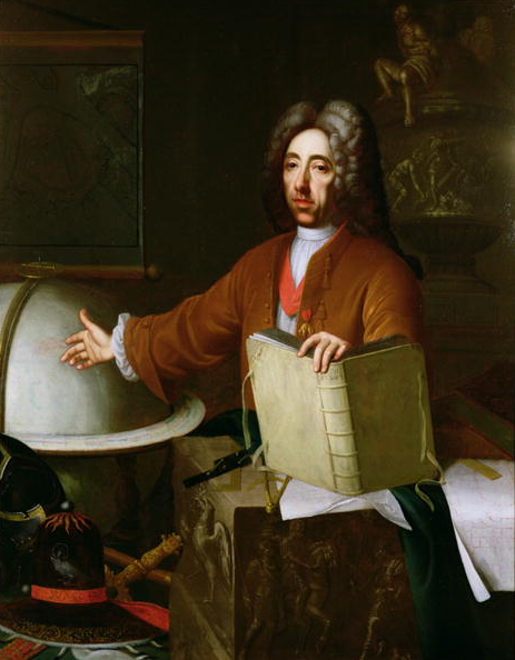 Ritratto del principe Eugwnio di Savoia (1663–1736)